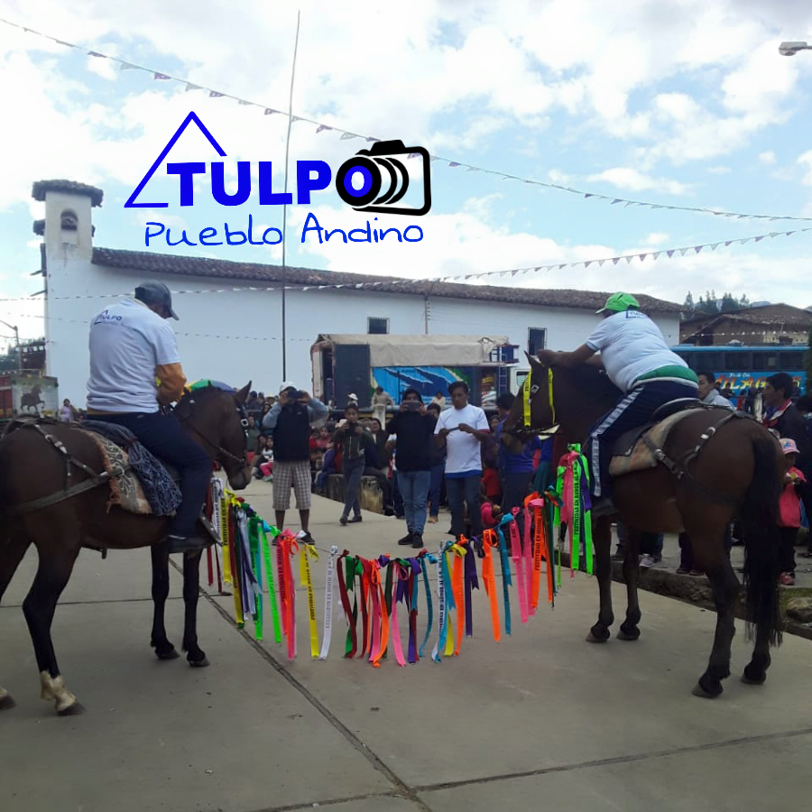 Esta actividad corresponde a la festividad en honor al Señor de la Misericordia - Santa Clara de Tulpo - Mollebamba - La Libertad - Perú.